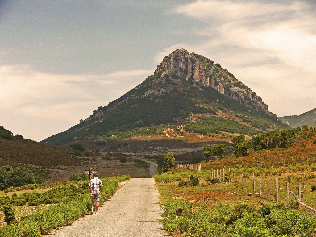 In geologia, i tacchi sono affioramenti di roccia, tipicamente di calcare e dolomia, in genere per trasformazioni avvenute nell'era mesozoica. In Italia se ne hanno diversi esempi in Sardegna nelle regioni dell' Ogliastra, della Barbagia e del Sarcidano. I Tacchi si formano con l'erosione millenaria, per azione degli agenti atmosferici, ma principalmente dell'acqua; spesso sono diventati degli altopiani dalla morfologia tormentata e irregolare, come accaduto per quelli di Ulassai, confusi con quelli di Jerzu che in realtà sono comunque di Ulassai. Esistono anche i tacchi di Osini, Gairo e Ussassai, tutti nell'Ogliastra, di Aritzo nella Barbagia di Belvi e di Laconi nel Sarcidano. Il tacco di Monte Perda Liana di Gairo, e il Tacco Texile di Artzo, sono stati definiti Monumento Naturale. Nella foto, monte Oseli, Supramonte di Urzulei-Baunei, territorio comunale di Urzulei Tra i materiali componenti i tacchi, due fra i più comuni sono la biotite, granito della regione dell' Ogliastra e le rocce carbonatiche del Mesozoico. Nell’area si trovano anche graniti grigi o con sfumature diverse tra il rosa ed il giallo, come le alpi e in particolare le dolomiti.